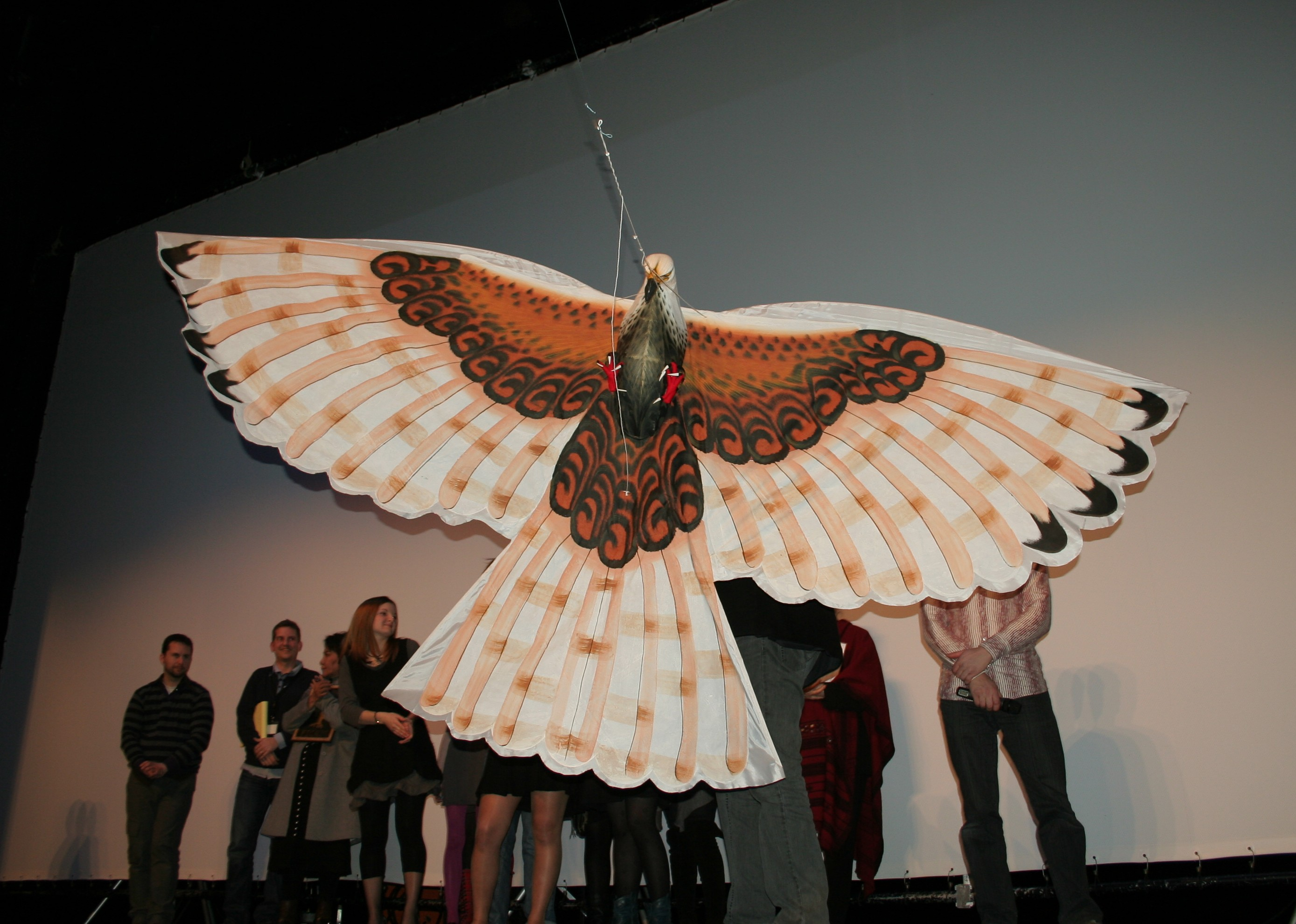 Cerf-volant dans le théâtre E. Feuillère, festival international des cinémas d'Asie 2010, Vesoul, France.